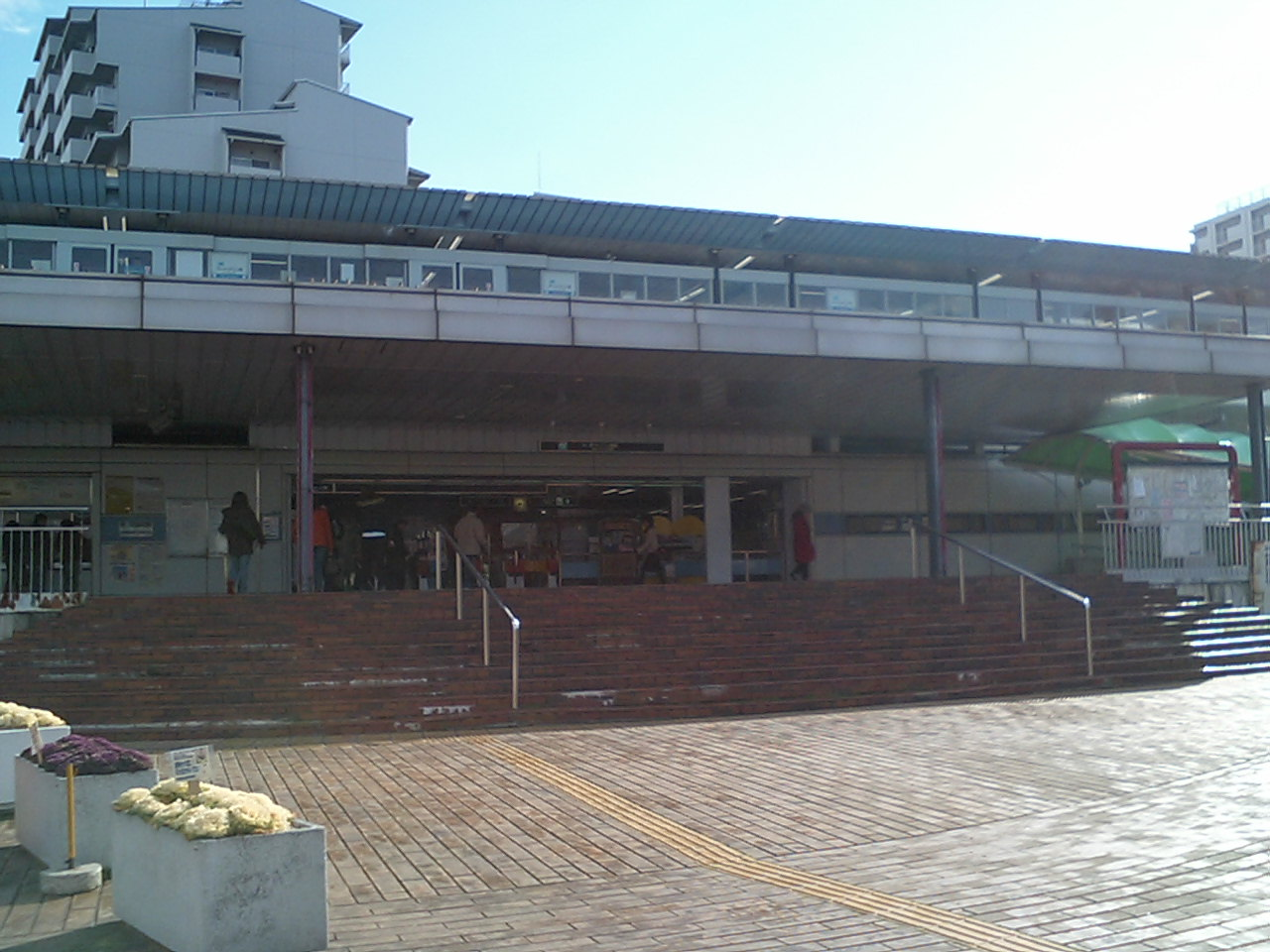 大阪市交通局南港ポートタウン線 ポートタウン東駅